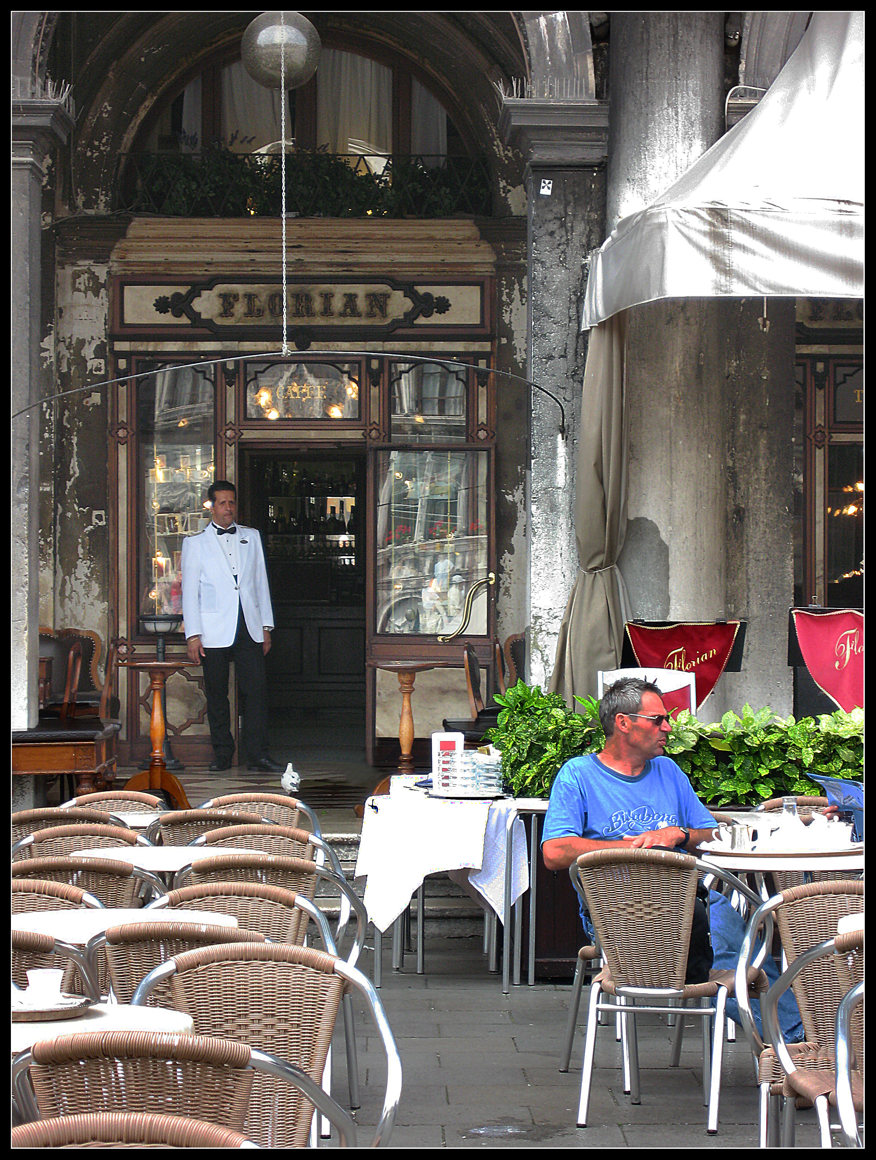 Caffe Florian.Piazza San Marco